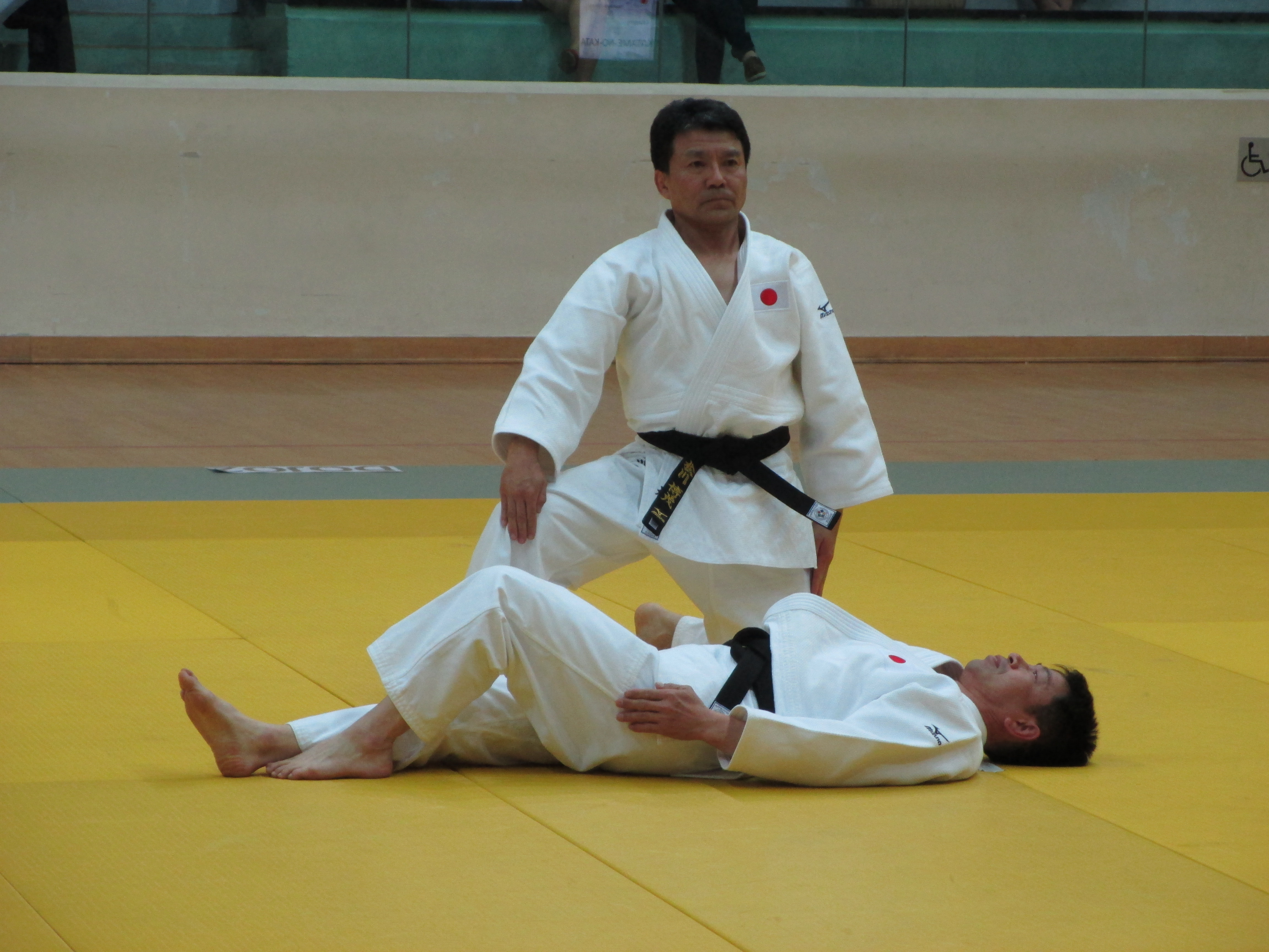 固の形での基本姿勢